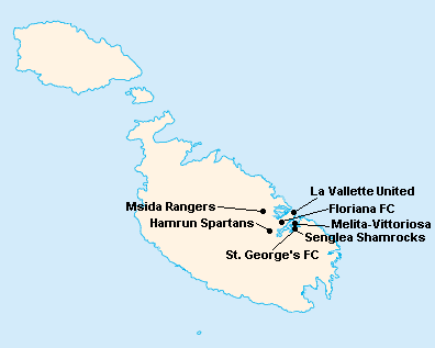 Répartition des clubs en First Division Maltaise 1913-1914.